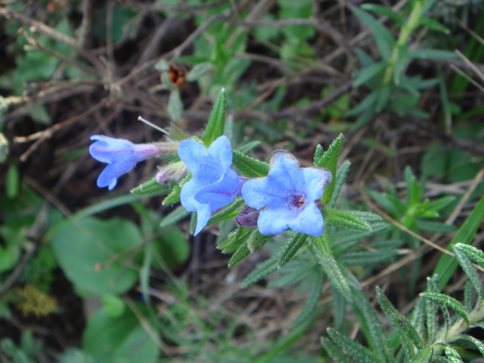 Litodora (Lithodora prostrata (Loisel.) Griseb.) subsp. lusitanica). Ceuta, España